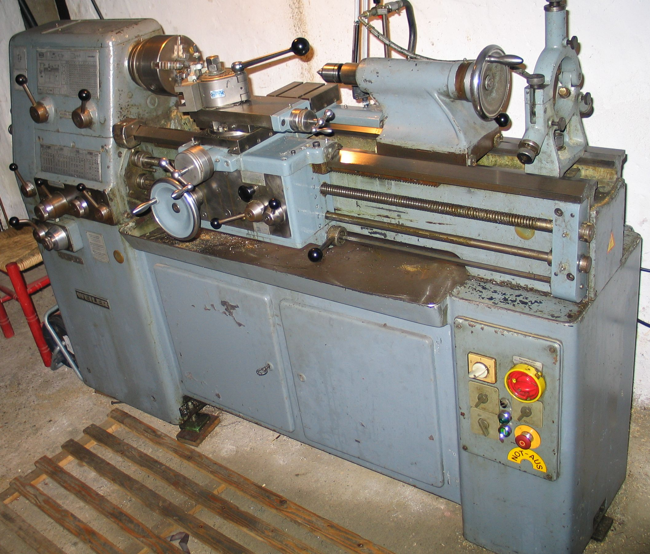 Leit- und Zugspindeldrehmaschine Weiler Condor VS, Baujahr 1975; Lünette ganz rechts (Abstellposition) montiert.